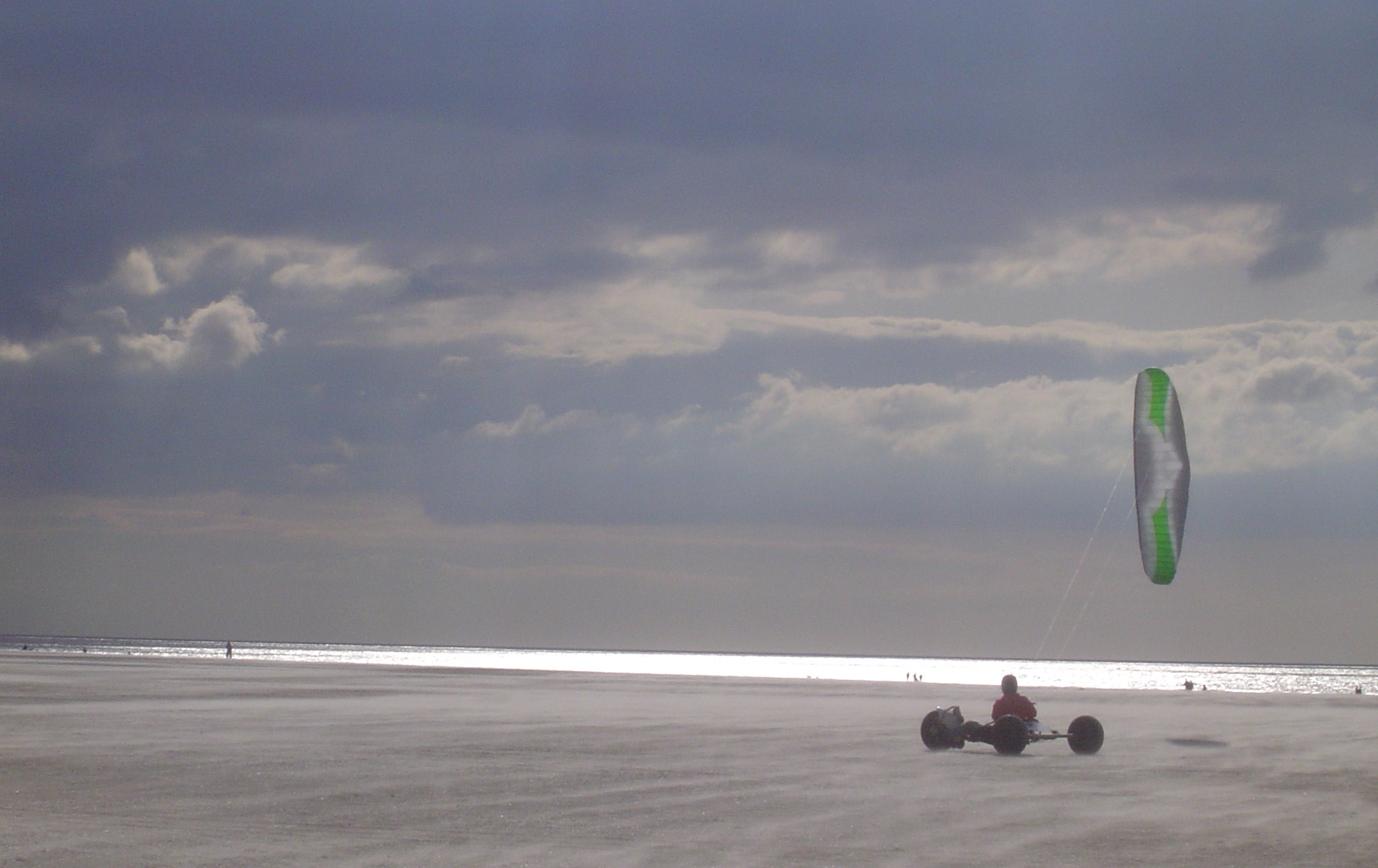 Piloto de Kite Buggy en la playa de Sankt Peter Ording -Alemania- Piloto: John Jansen. H-64. Actual Campeón de Europa y Campeón del Mundo.